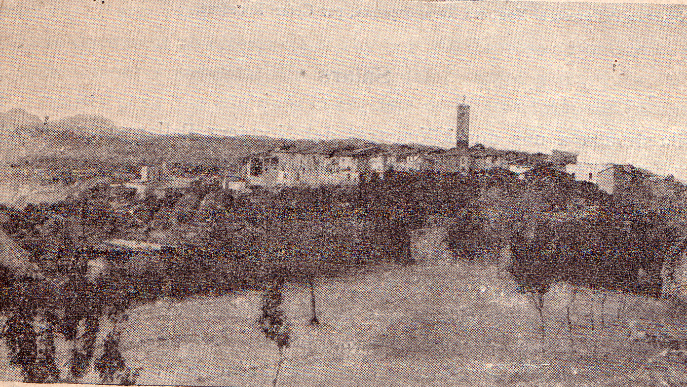 Fotografia de Salàs de Pallars el 1900 (Pallars Jussà)